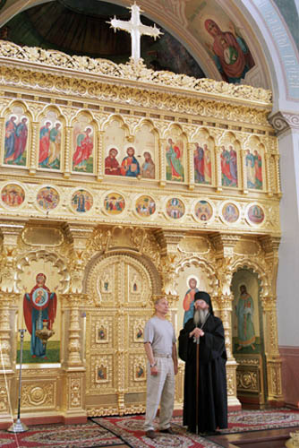 КАРЕЛИЯ. С игуменом Валаамского Спасо-Преображенского монастыря архимандритом Панкратием во время осмотра одного из храмов монастыря.